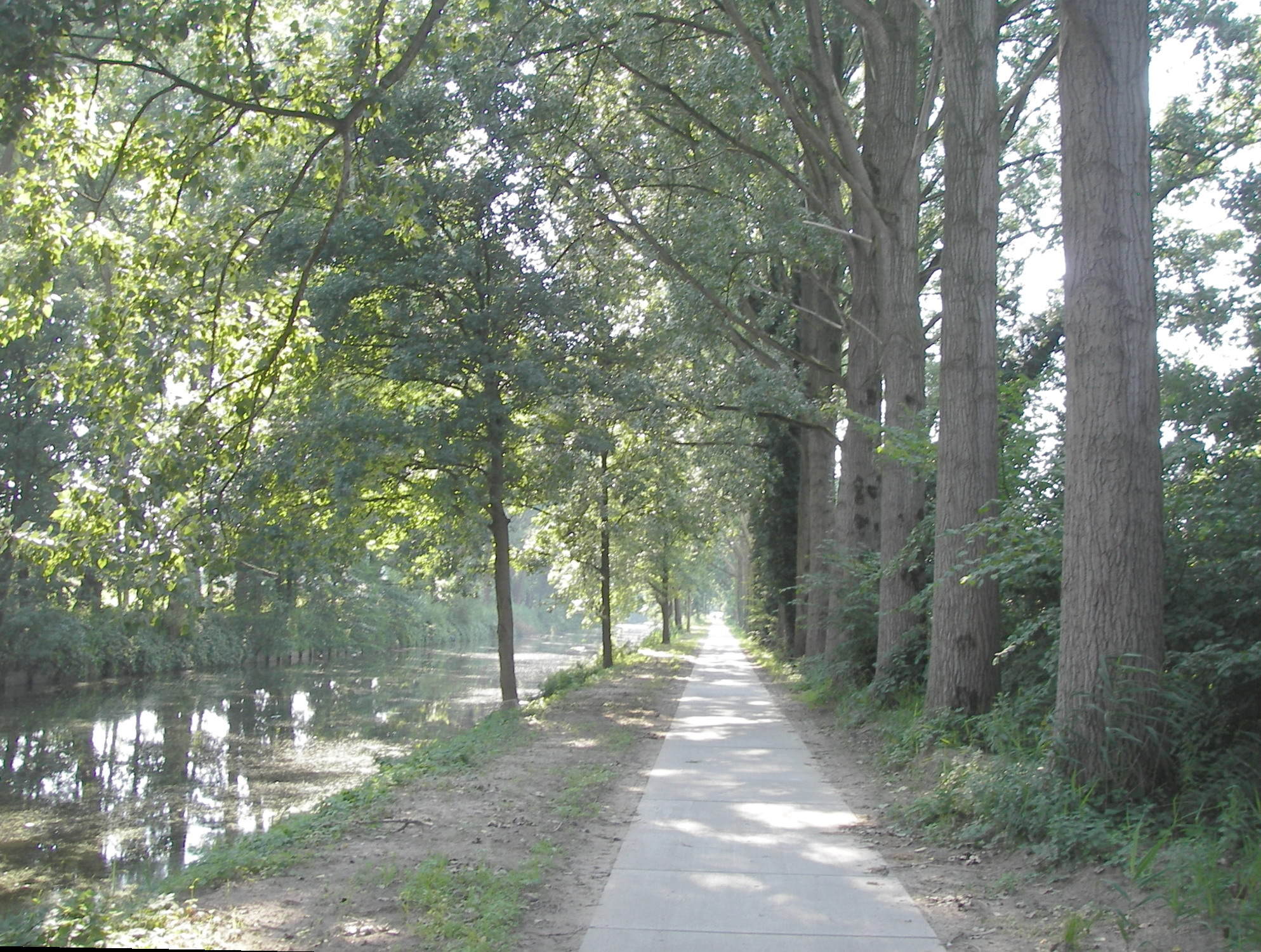 Eindhovensch kanaal bij Mierlo